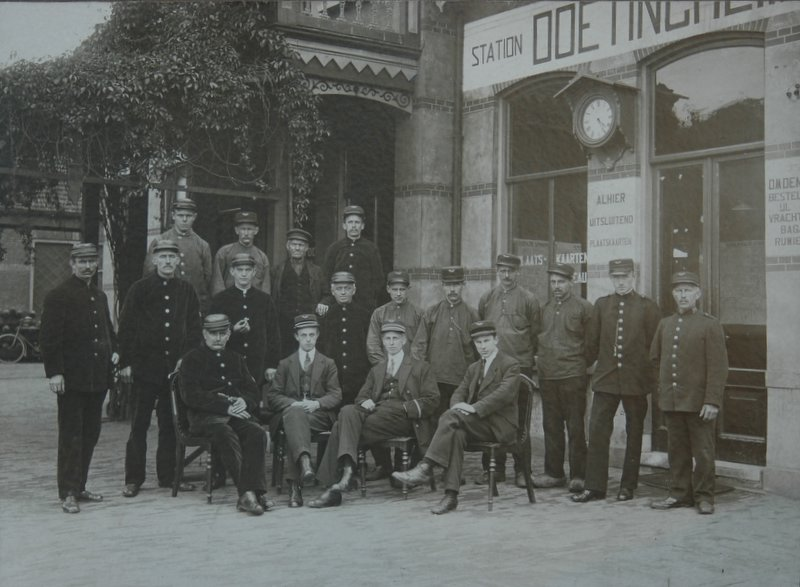 Gelderse Stoomtram 27 juni 1921. Foto in archief OVM.